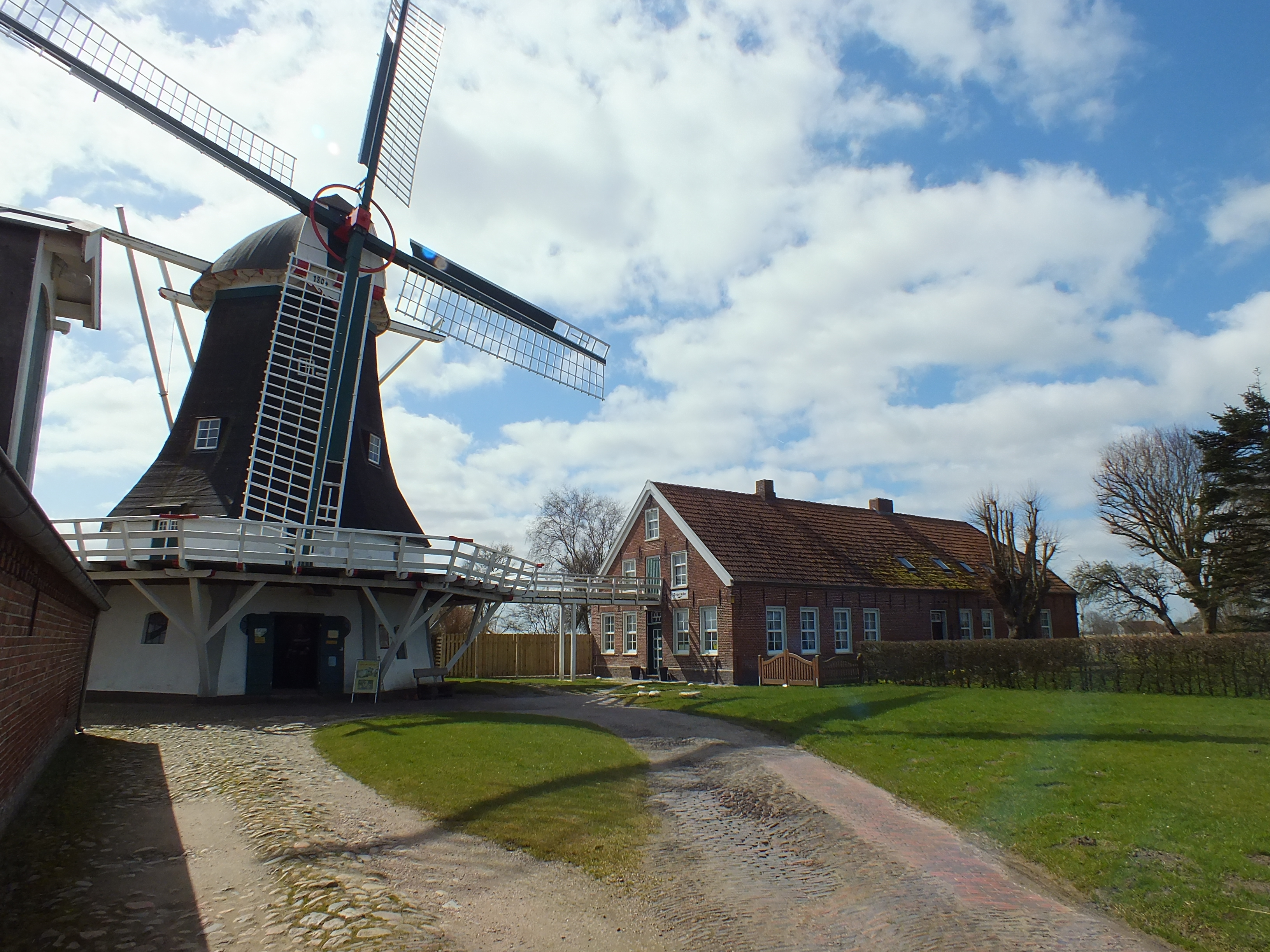 Seriemer Mühle bei Neuharlingersiel